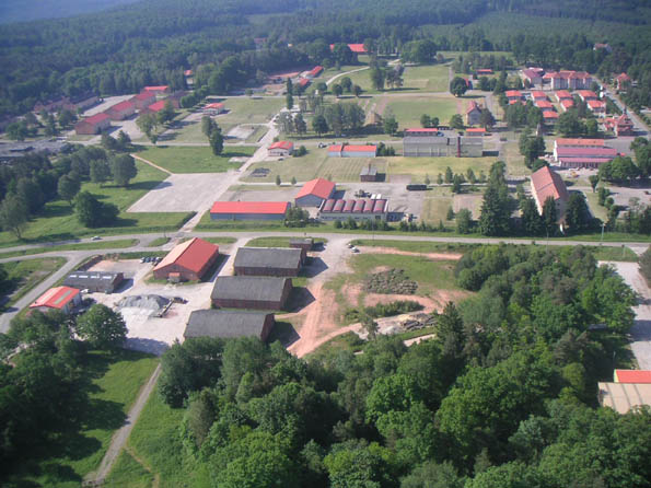 Le camp de Bitche vu du ciel